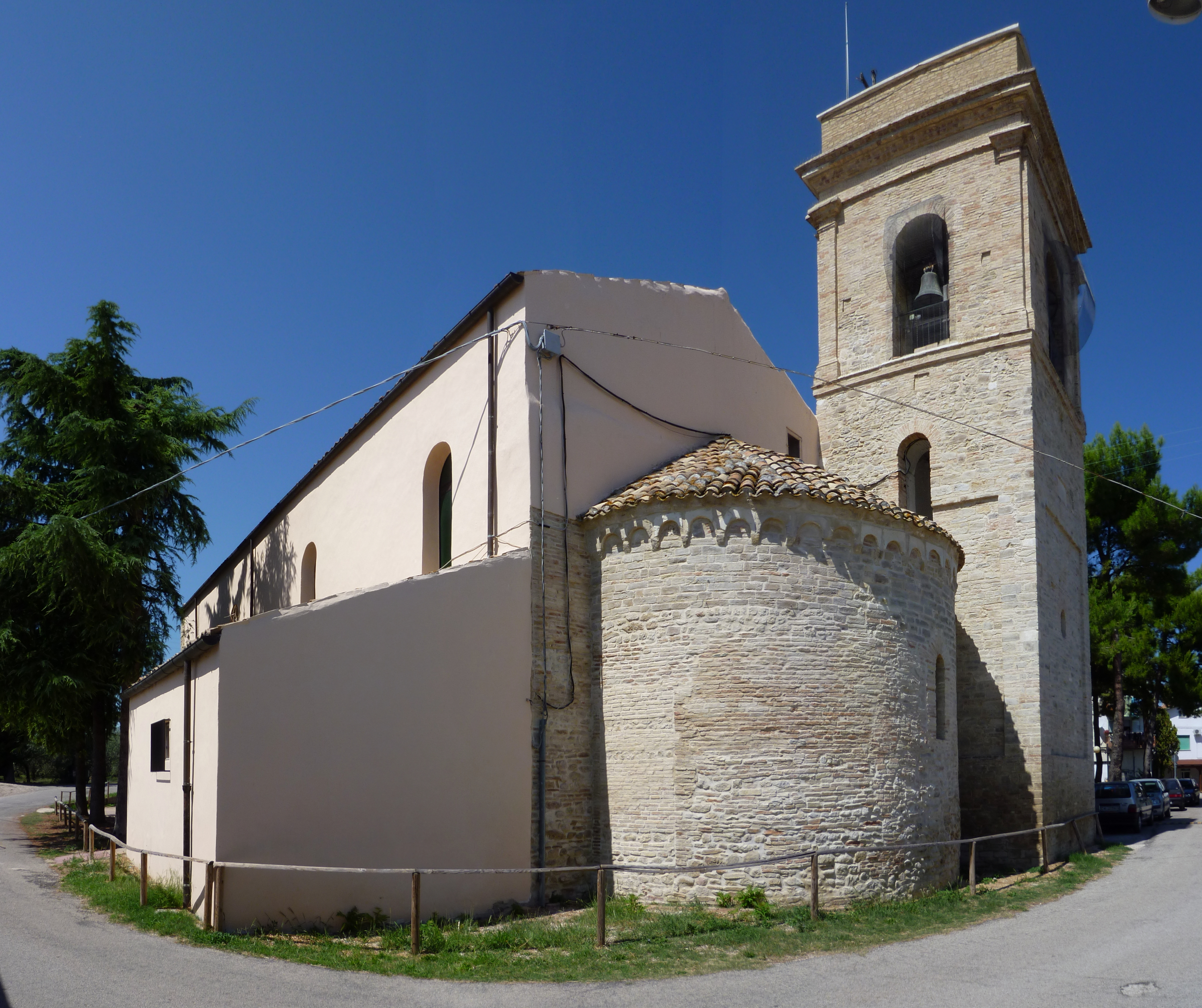 Abside e campanile della chiesa Santa Maria Imbaro. Santa Maria Imbaro (CH).